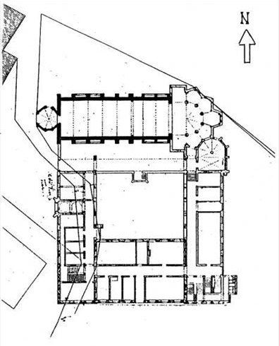 Kloosters Paters Redemptoristen, Roermond, plattegrond. Gedeeltelijk uitgevoerd.